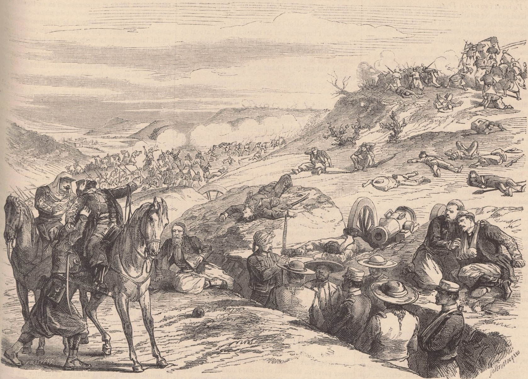 Expédition du Mexique. — Recontre de Cerro-Majama. — Mort du colonel Martin. — Le 2e zouave défait les forces réunies de Juarez, Negrete, Doblado et Patoni. (Croquis du sergent C. R., communiqués par M. Pignard.)